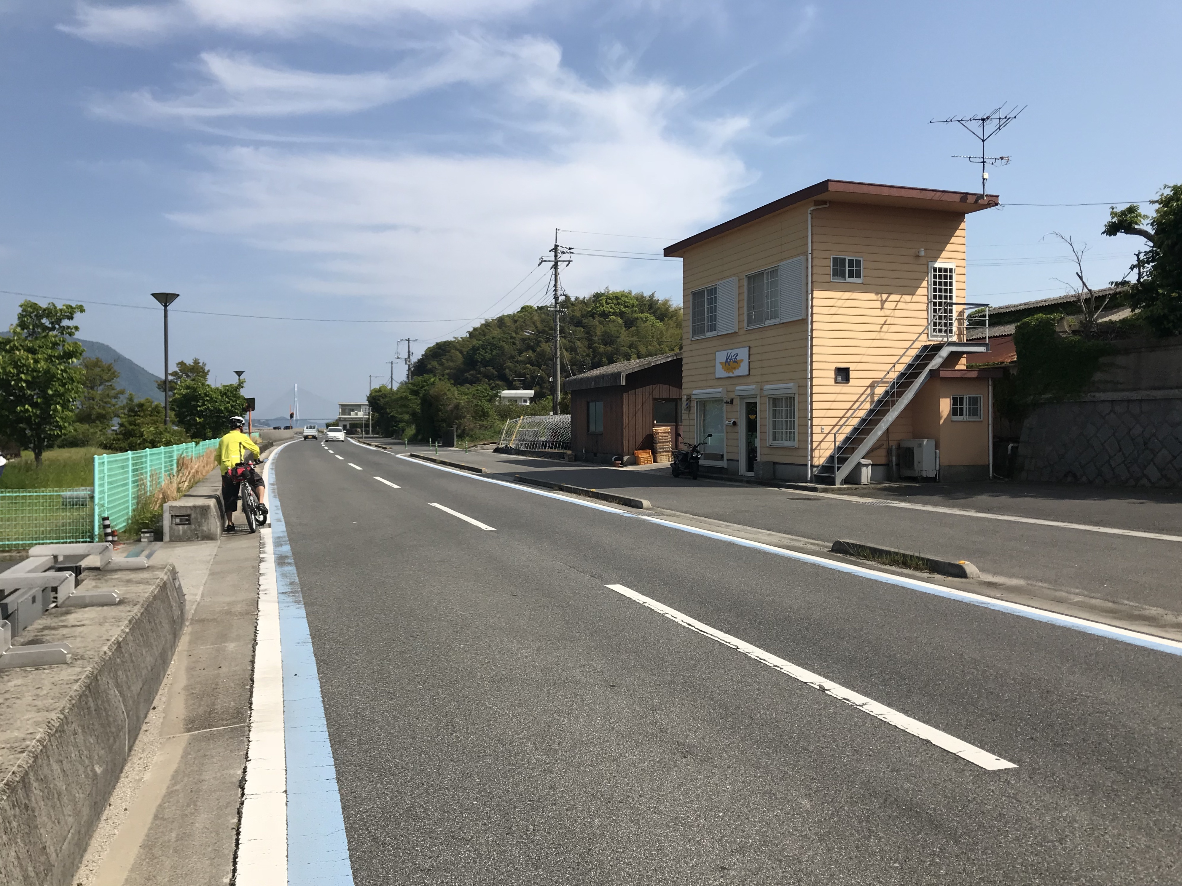 盛港付近の愛媛県道51号